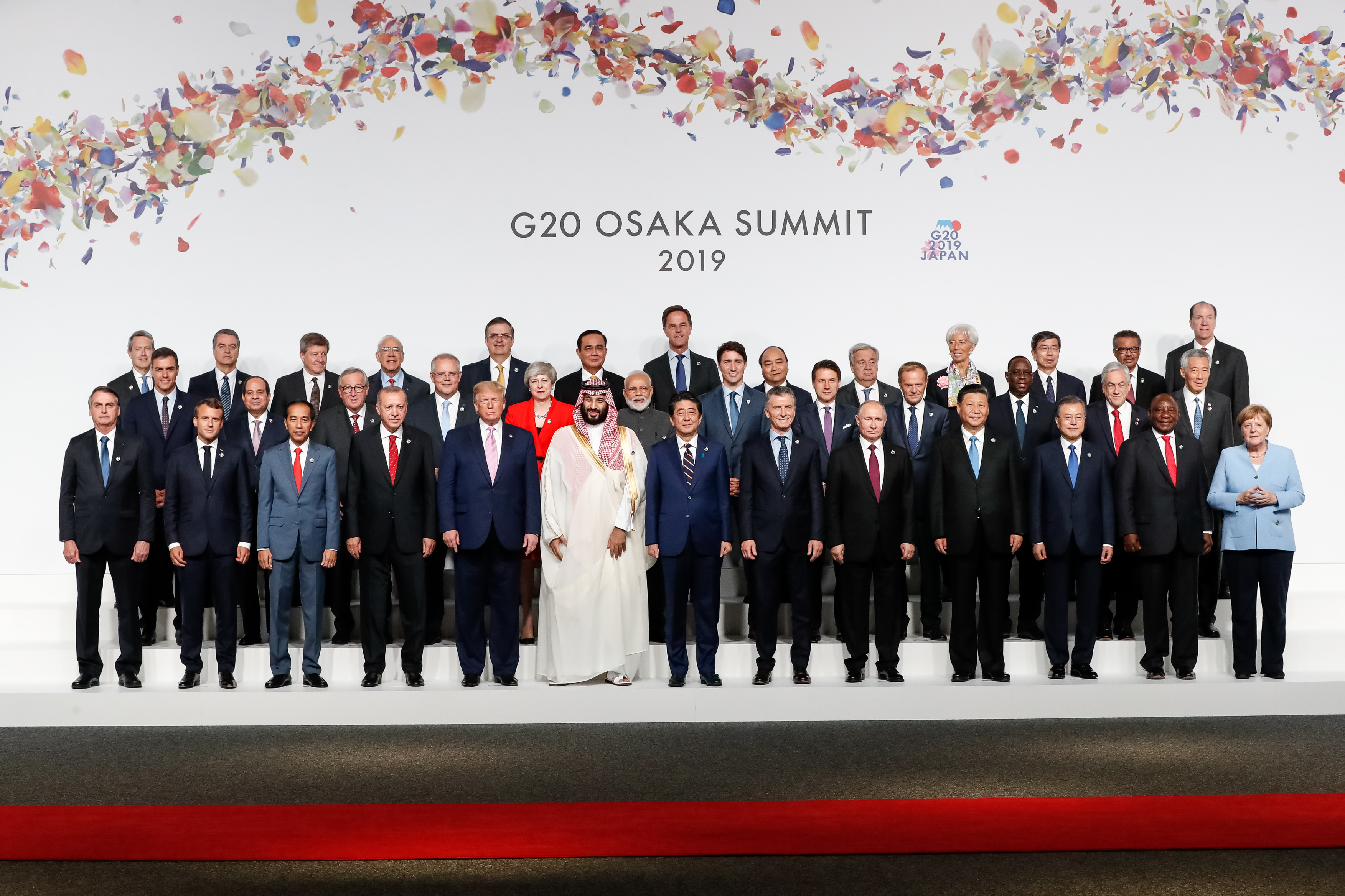 (Osaka - Japão, 28/06/2019) Presidente da República, Jair Bolsonaro, durante foto de família dos Líderes do G20. Foto: Alan Santos/PR